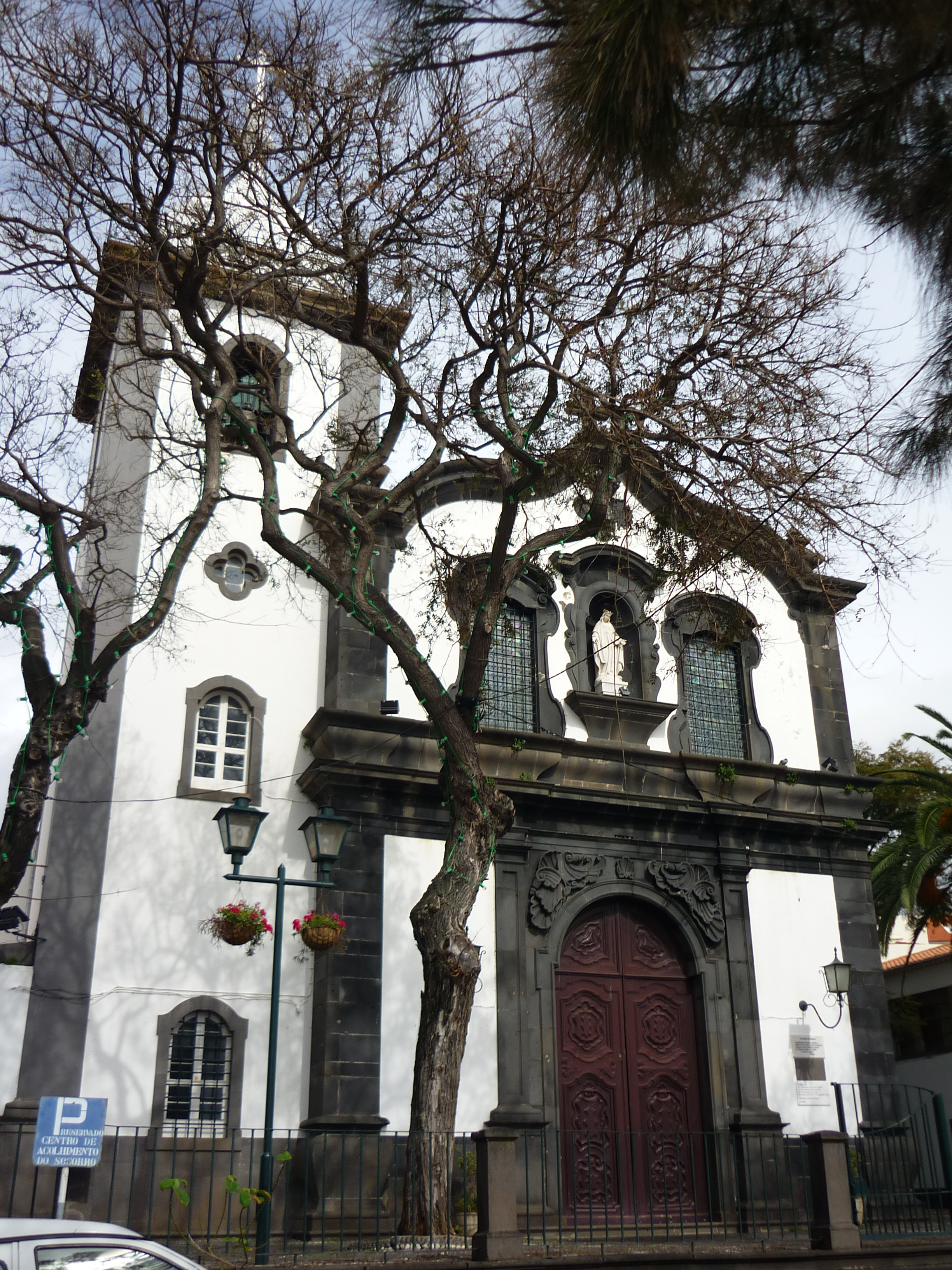 Az óváros plébániatemploma Funchalban (Madeira)